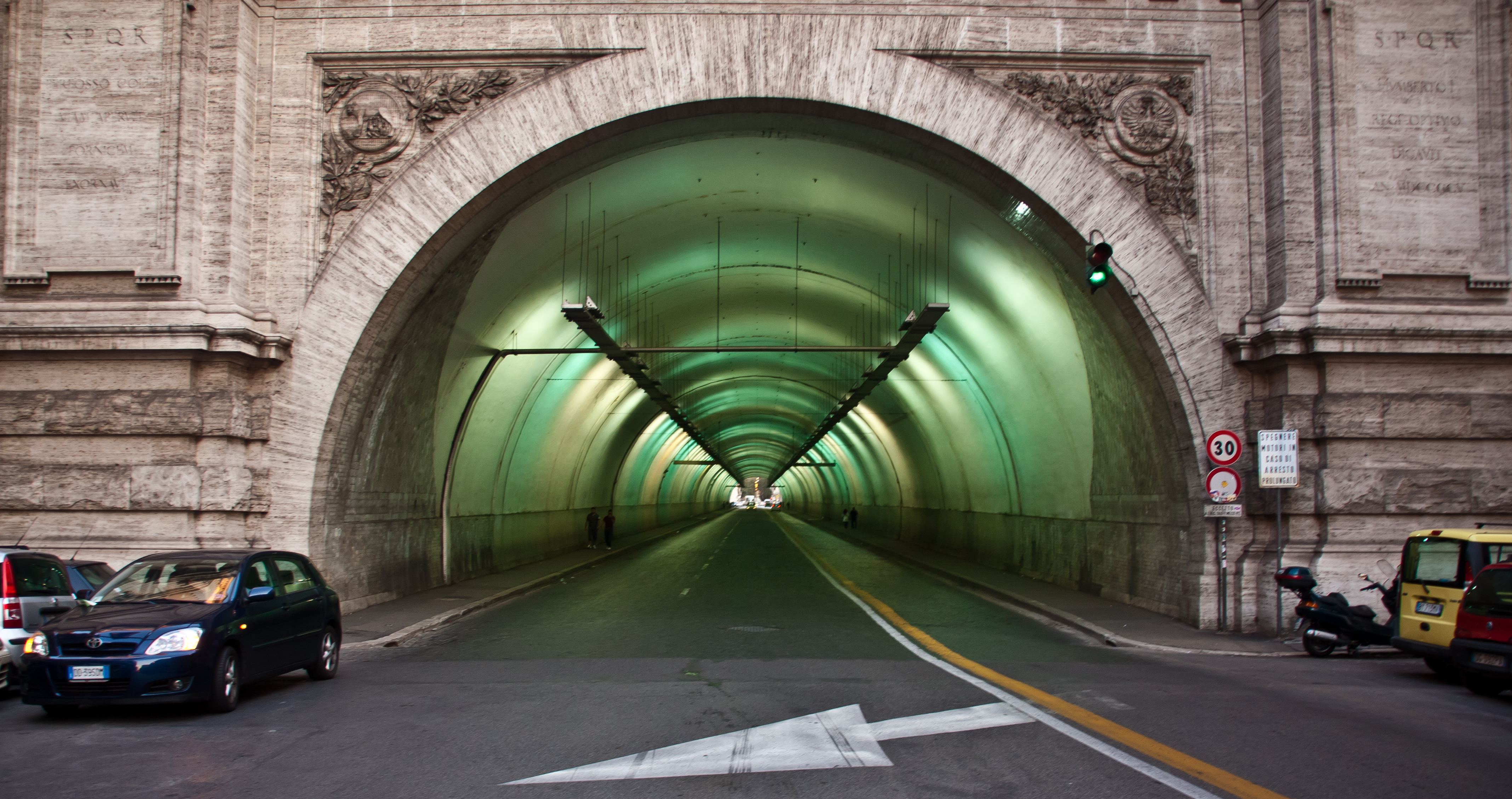 Roma, Traforo Umberto I